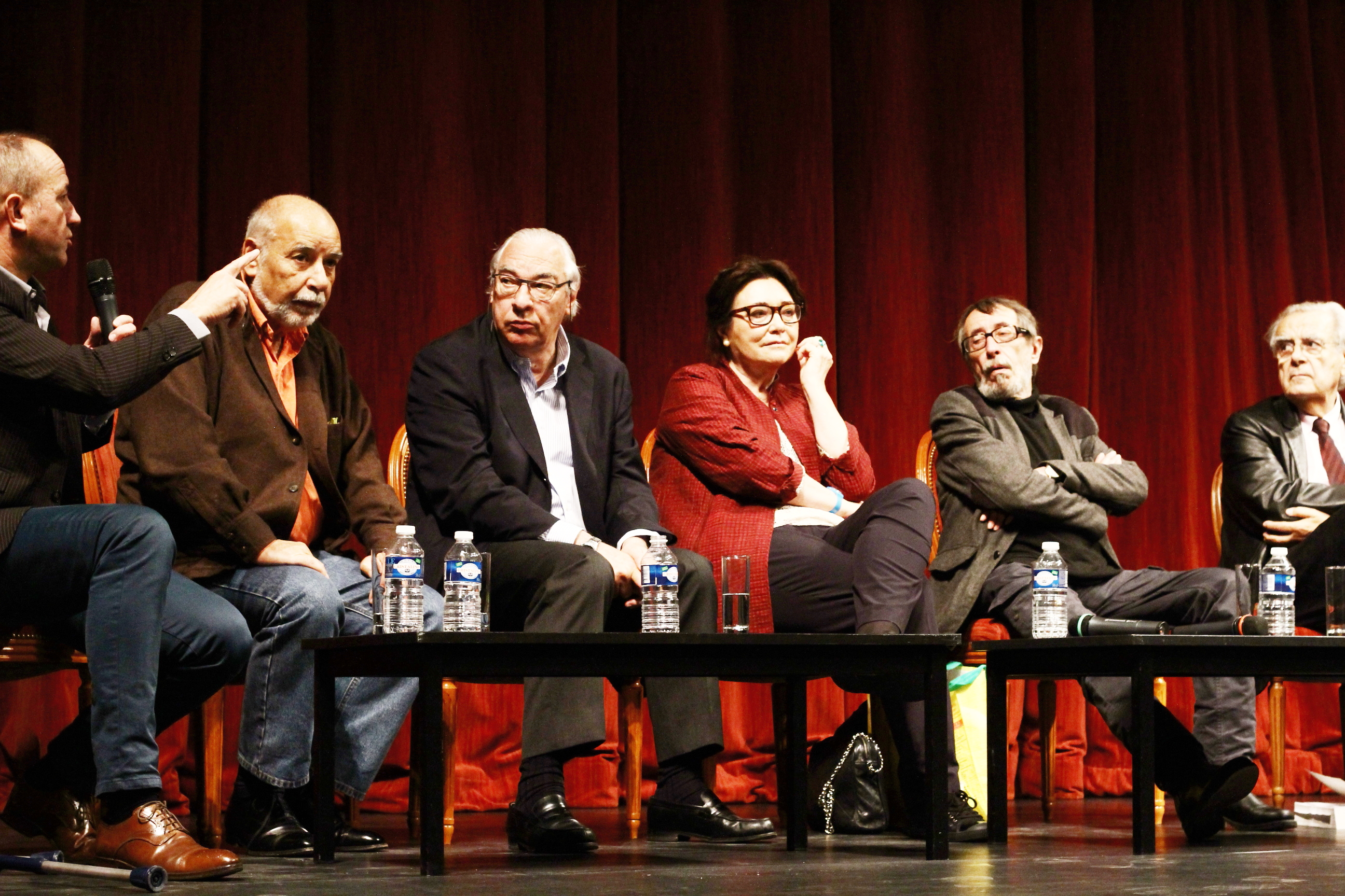 Members of the Académie Goncourt. À l'Opéra de Nancy, pour le Livre sur la Place en septembre 2013. De gauche à droite : Philippe Claudel, Tahar Ben Jelloun, Didier Decoin, Paule Constant, Patrick Rambaud, Bernard Pivot.